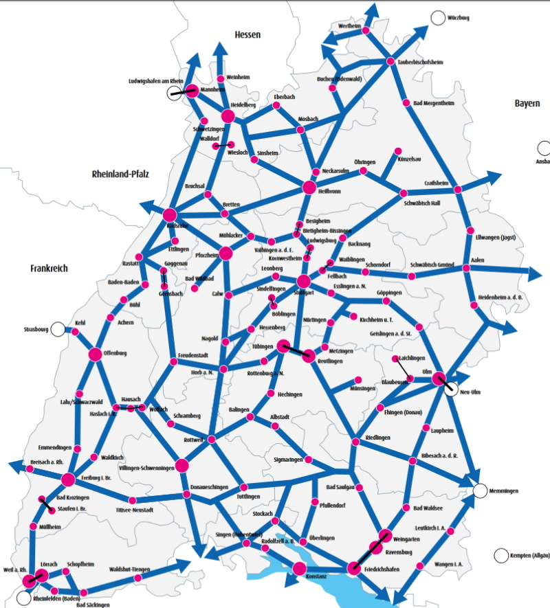 RadNETZ BW